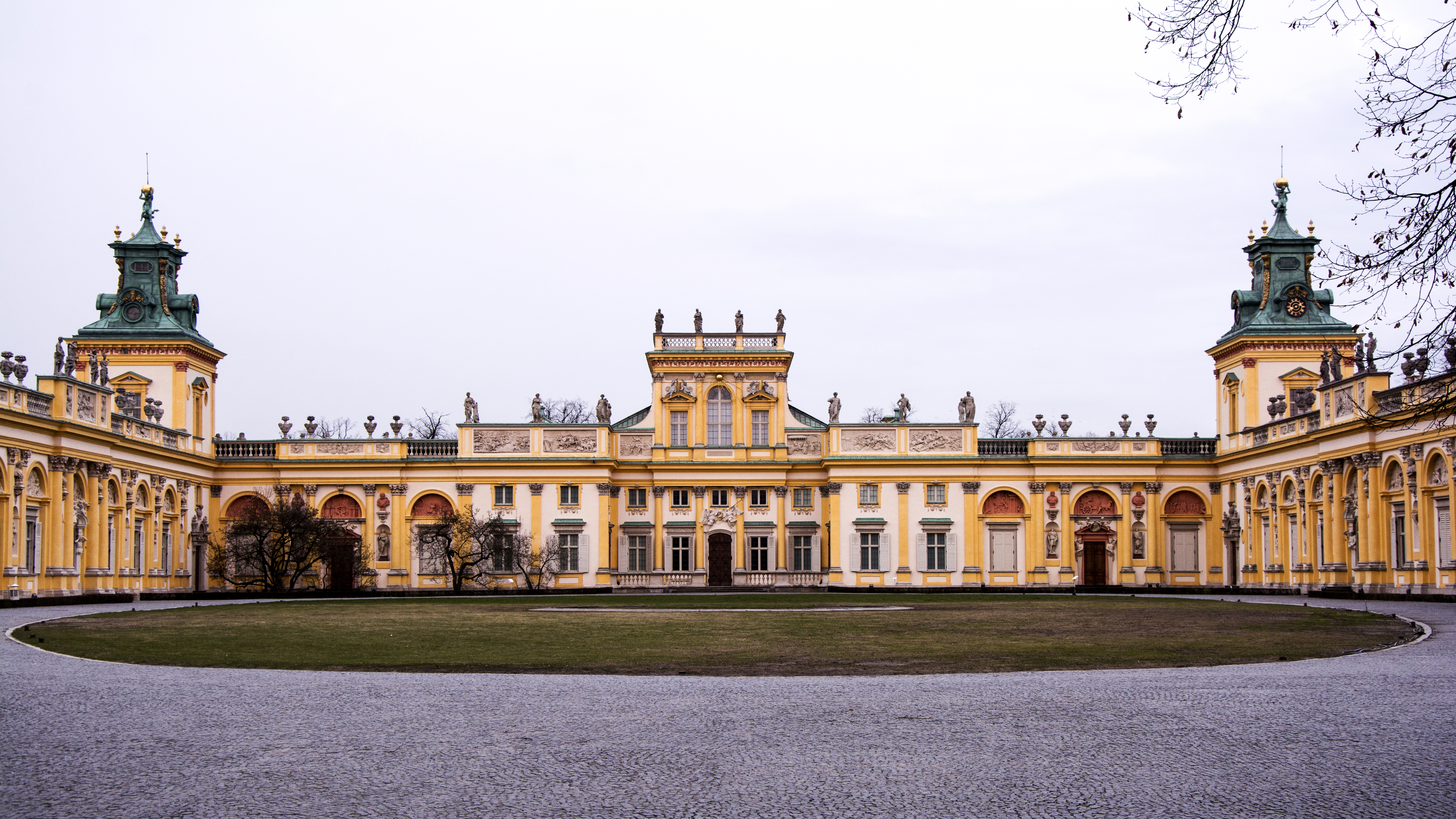 Wilanów, pałac Królewski, 1677-96, 1723-32, XIX, z Łazienką Lubomirskiej (Marconiówka), 1775-78, 1893